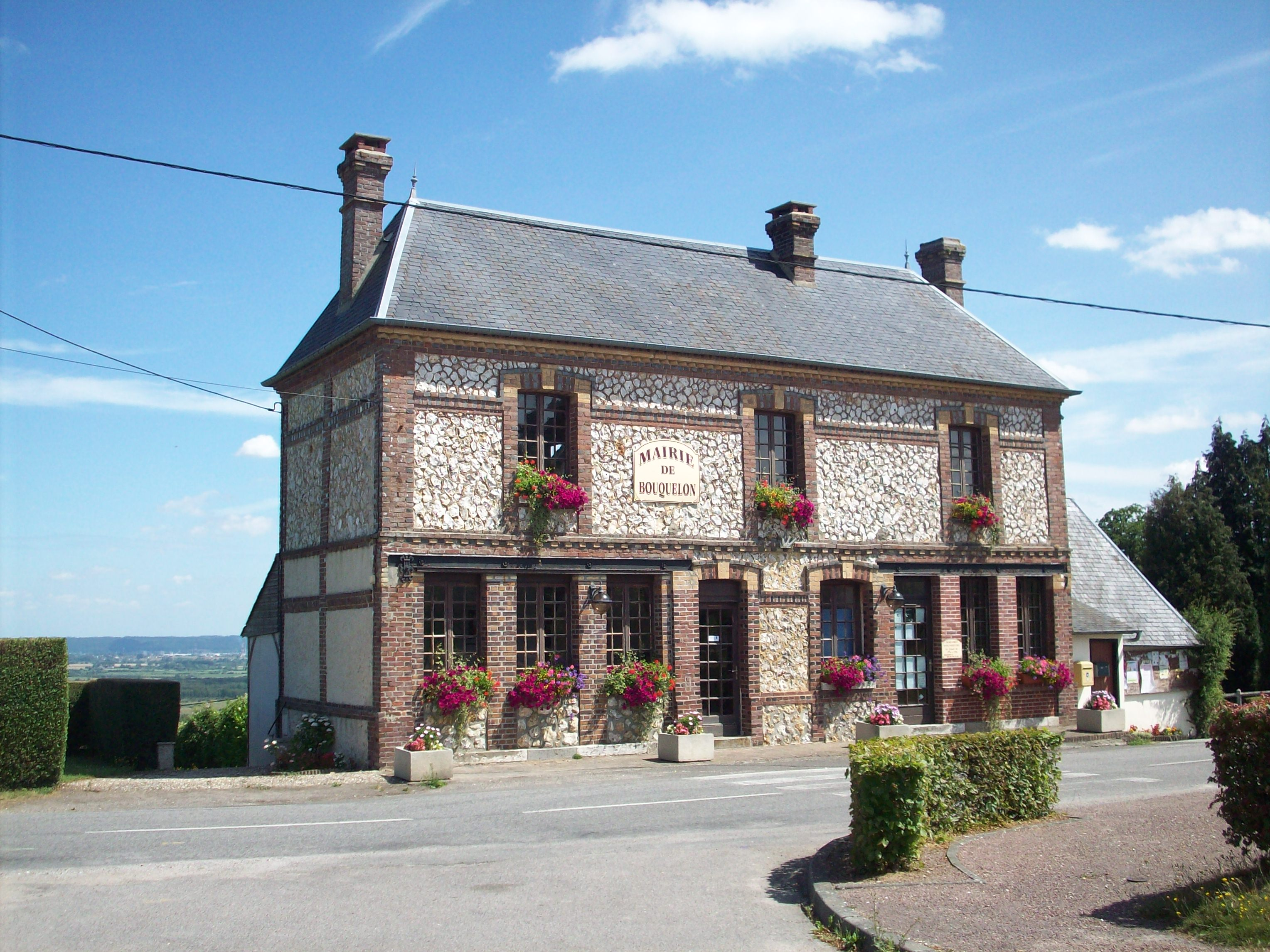 Mairie de Bouquelon